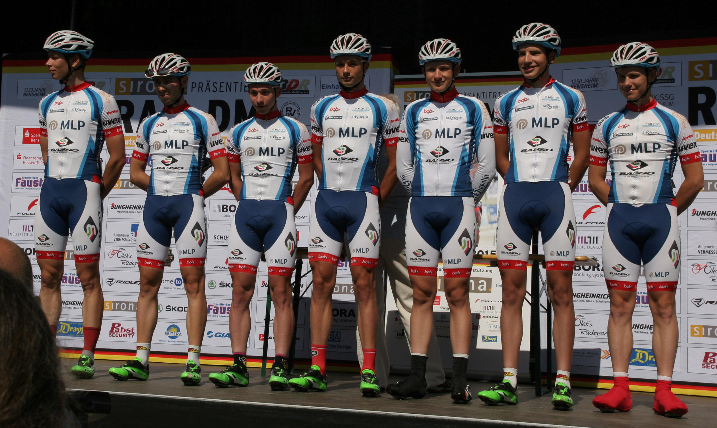 MLP Team Bergstraße bei der Vorstellung vor dem Rennen. Foto von den Deutschen Meisterschaften im Straßenrennen der Männer (Elite) am 28. Juni 2015 in Bensheim (Hessen)